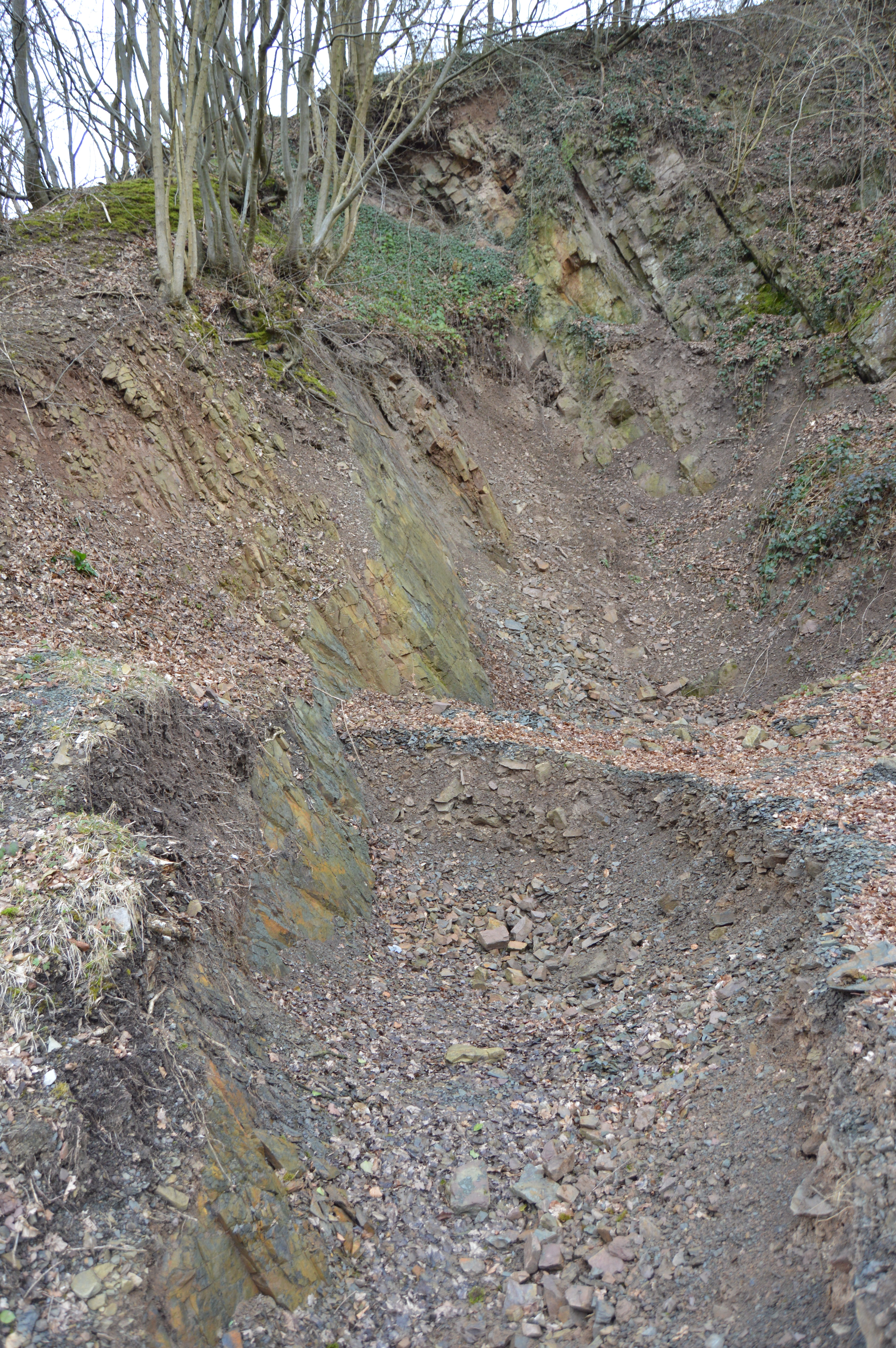 Carrière du Trou de Strud, Gesves, Belgique